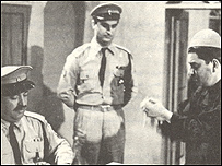 *عبدالعلی همایون در سریال سرکار استوار